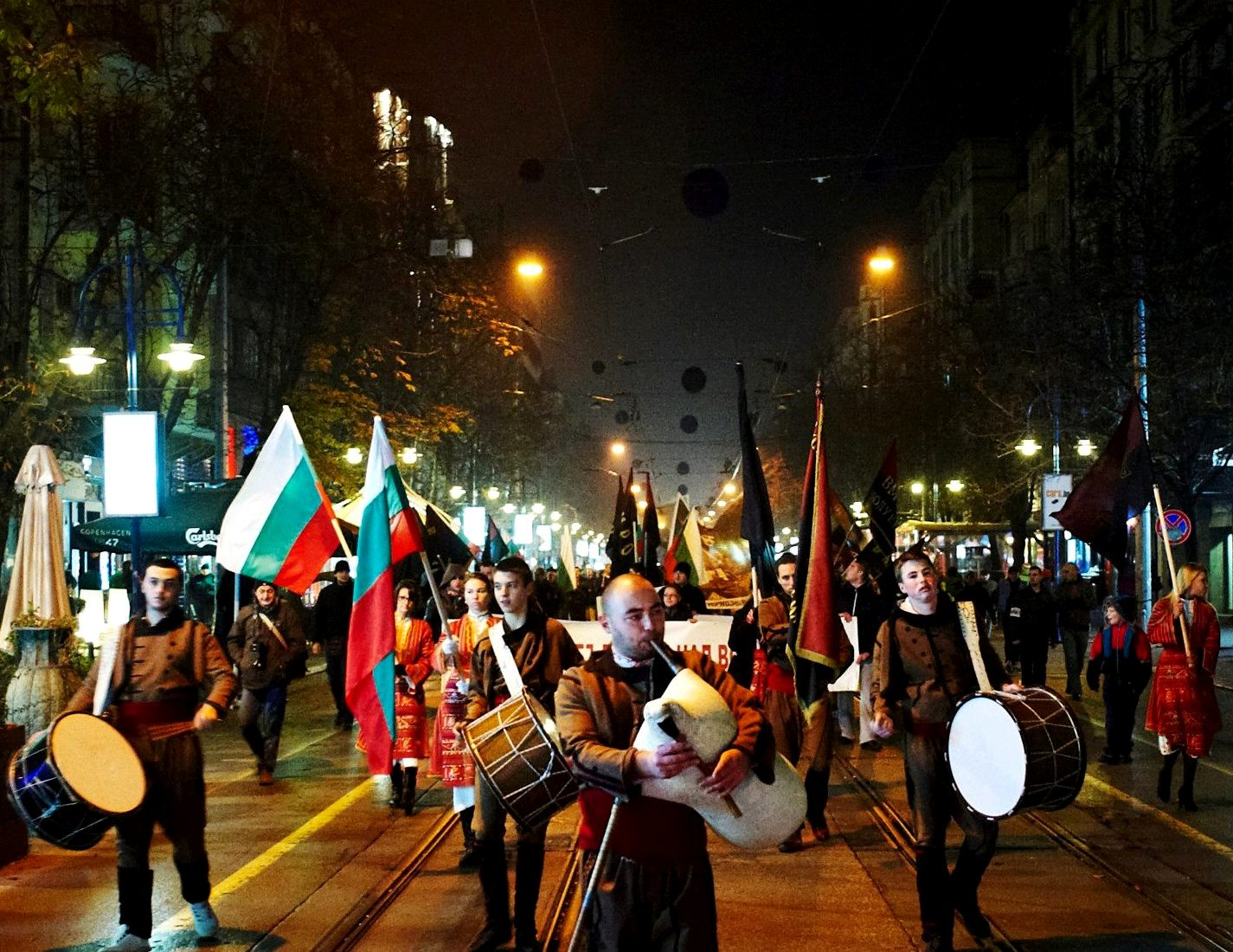 27 ноември 2012 г.; ВМРО /IMRO/